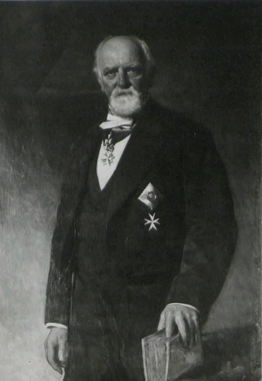 Moritz von Blanckenburg (1815−1888); Foto (17 cm × 12 cm) eines Ölgemäldes; Provenienz: Stadtbücherei Stettin.